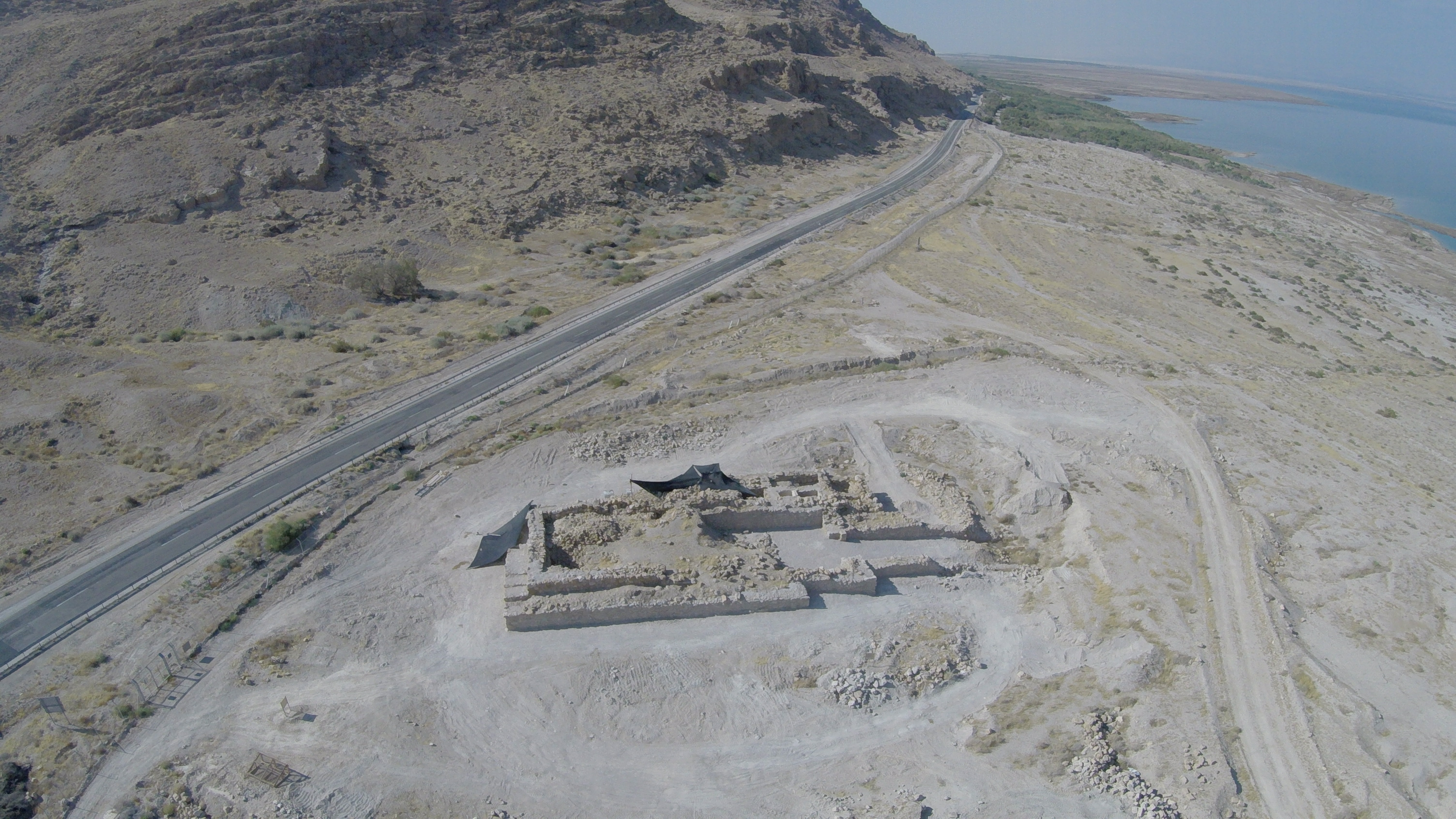 מצד קידרון מהאוויר